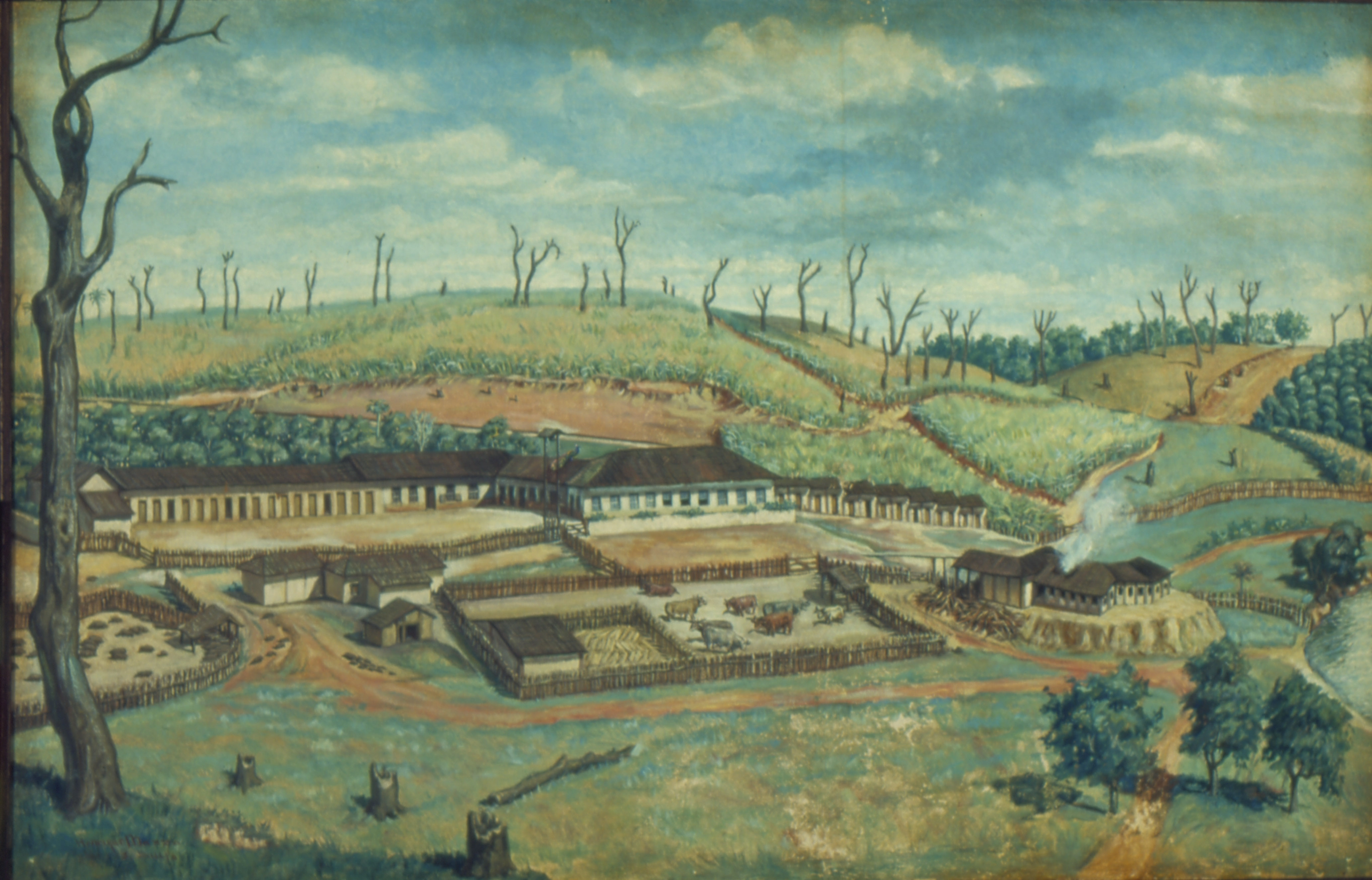 Obra que integra o acervo do Museu Paulista da USP. Coleção Fundo Museu Paulista - FMP